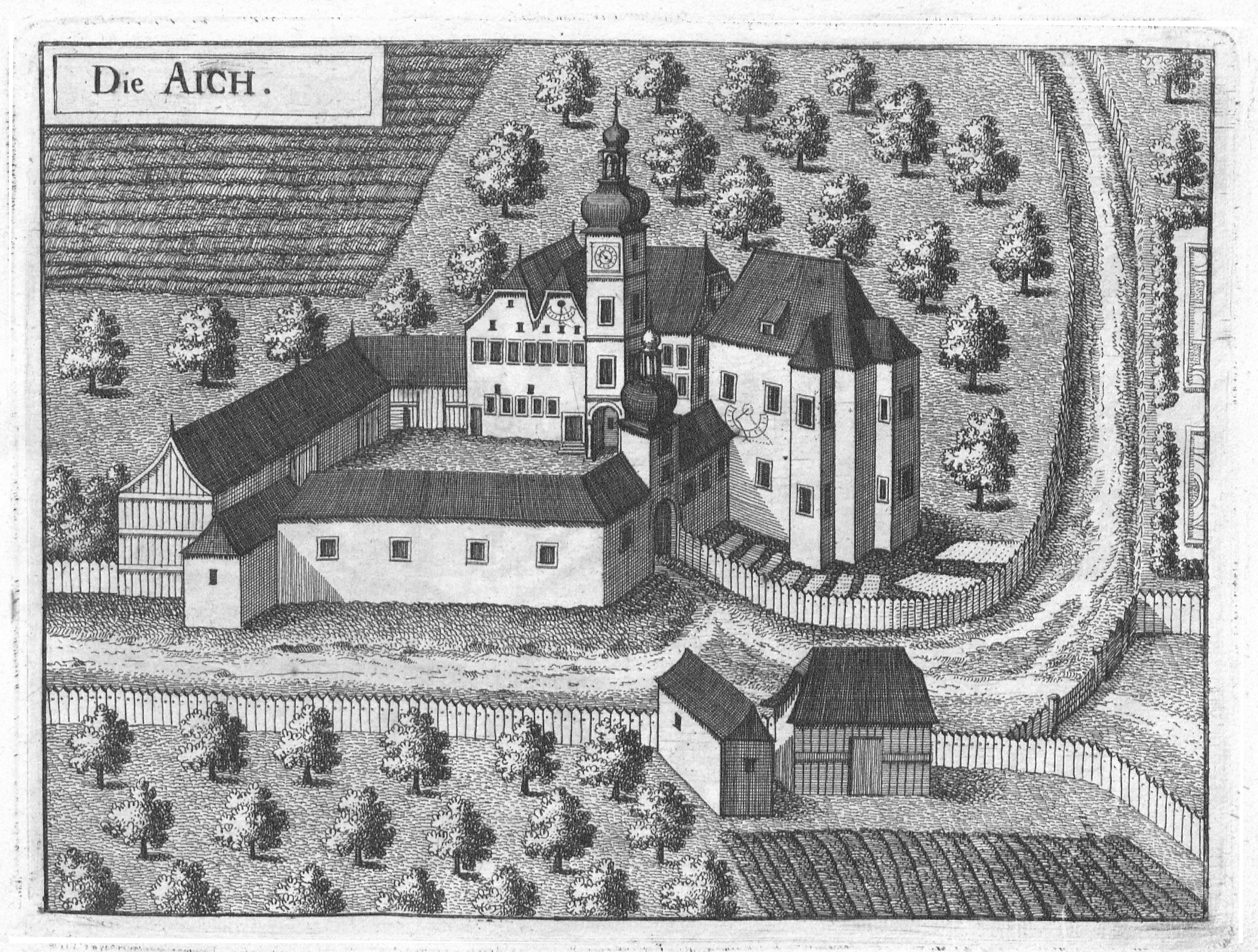 Schloss Aich um 1674